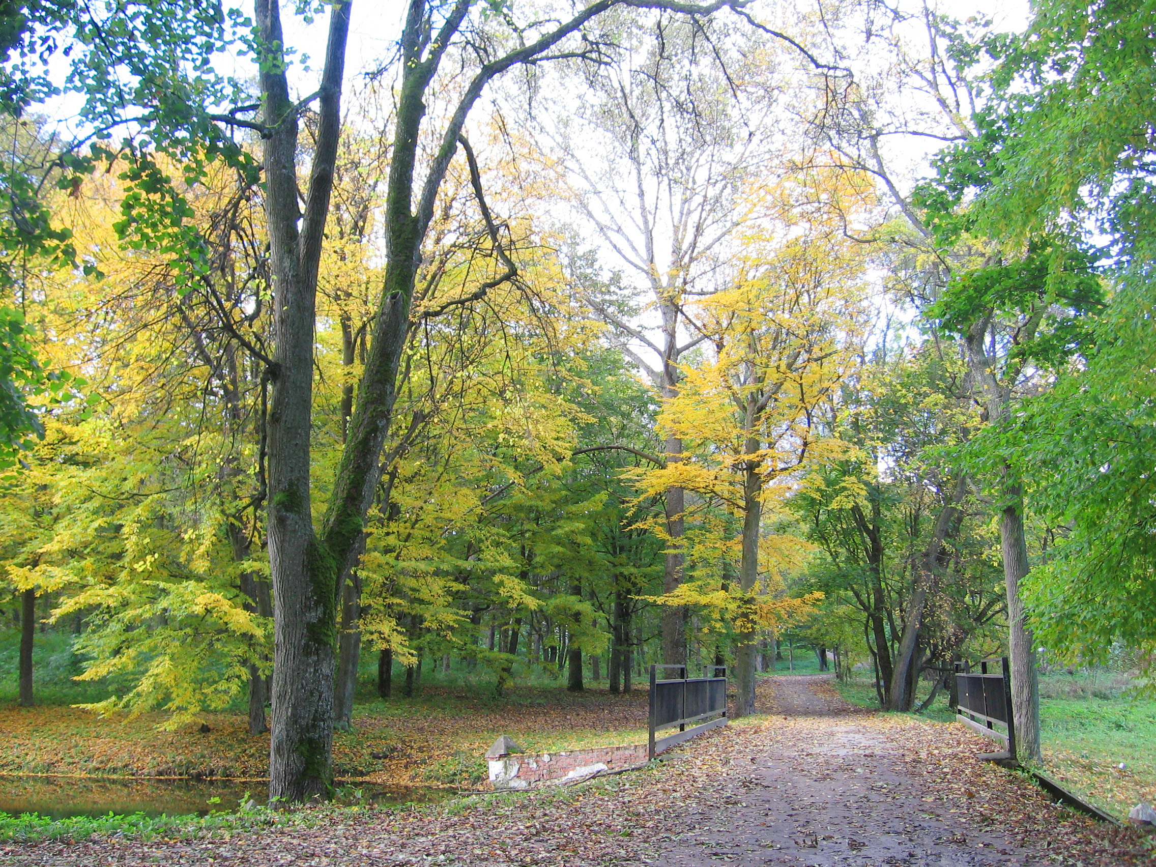 Беларуская (тарашкевіца): Фрагмэнты палацава-паркавага ансамблю:палацдва флігеліслужбовы корпусэлемэнты абарончых збудаваньняў (водная сістэма, земляныя валы, рэшткі ўязной брамы)паркбылая аранжарэя. г. Высокае This is a photo of Belarusian heritage monument. Reference number: 112Г000337 ( WLM)